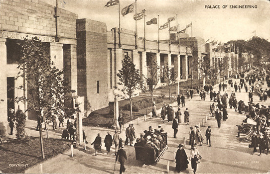 In Verbindung mit der Messe des britischen Kolonialreiches (British Empire Exhibition) veröffentlichte Ansichtskarte